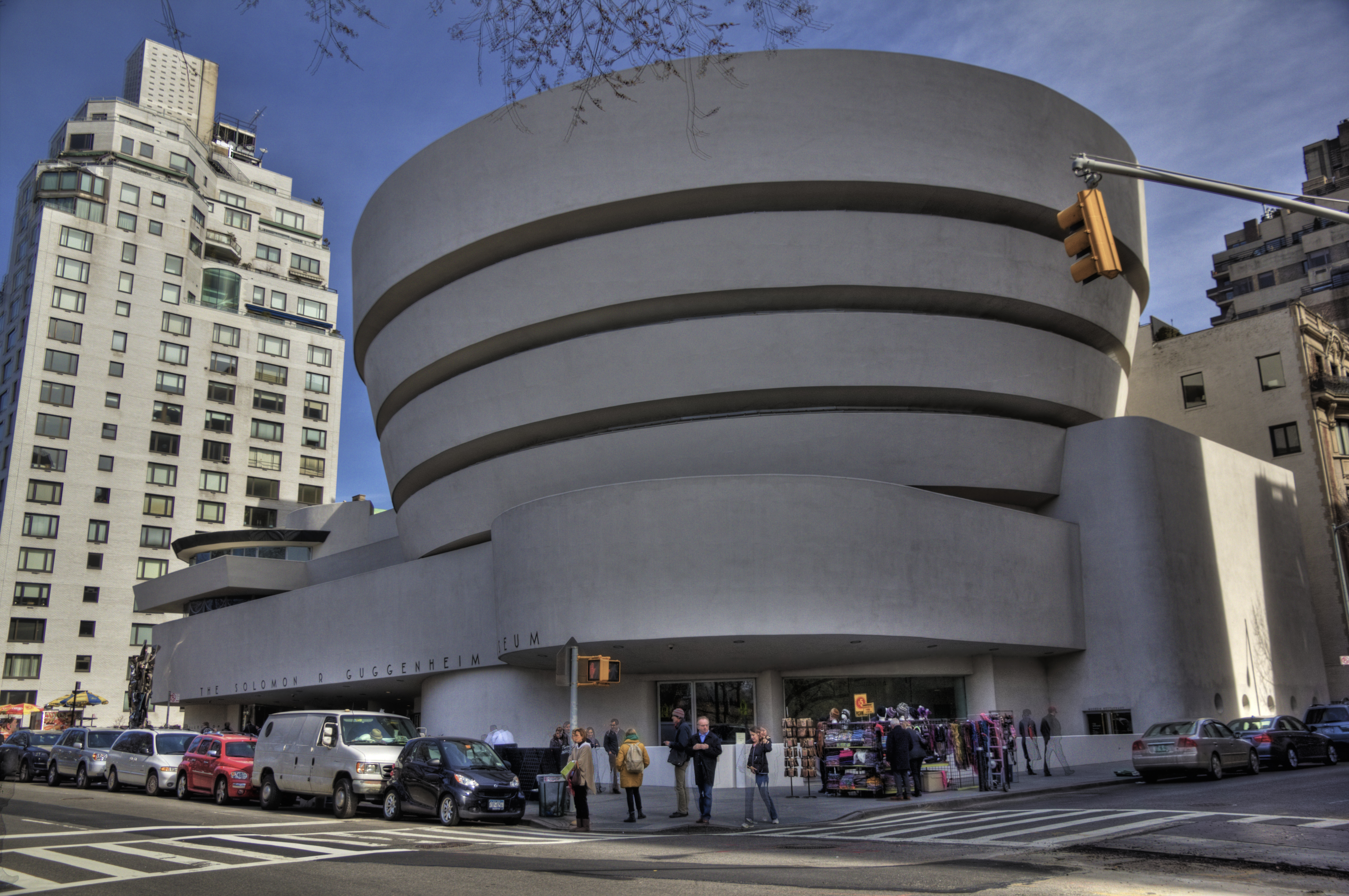 Solomon R. Guggenheim Museum